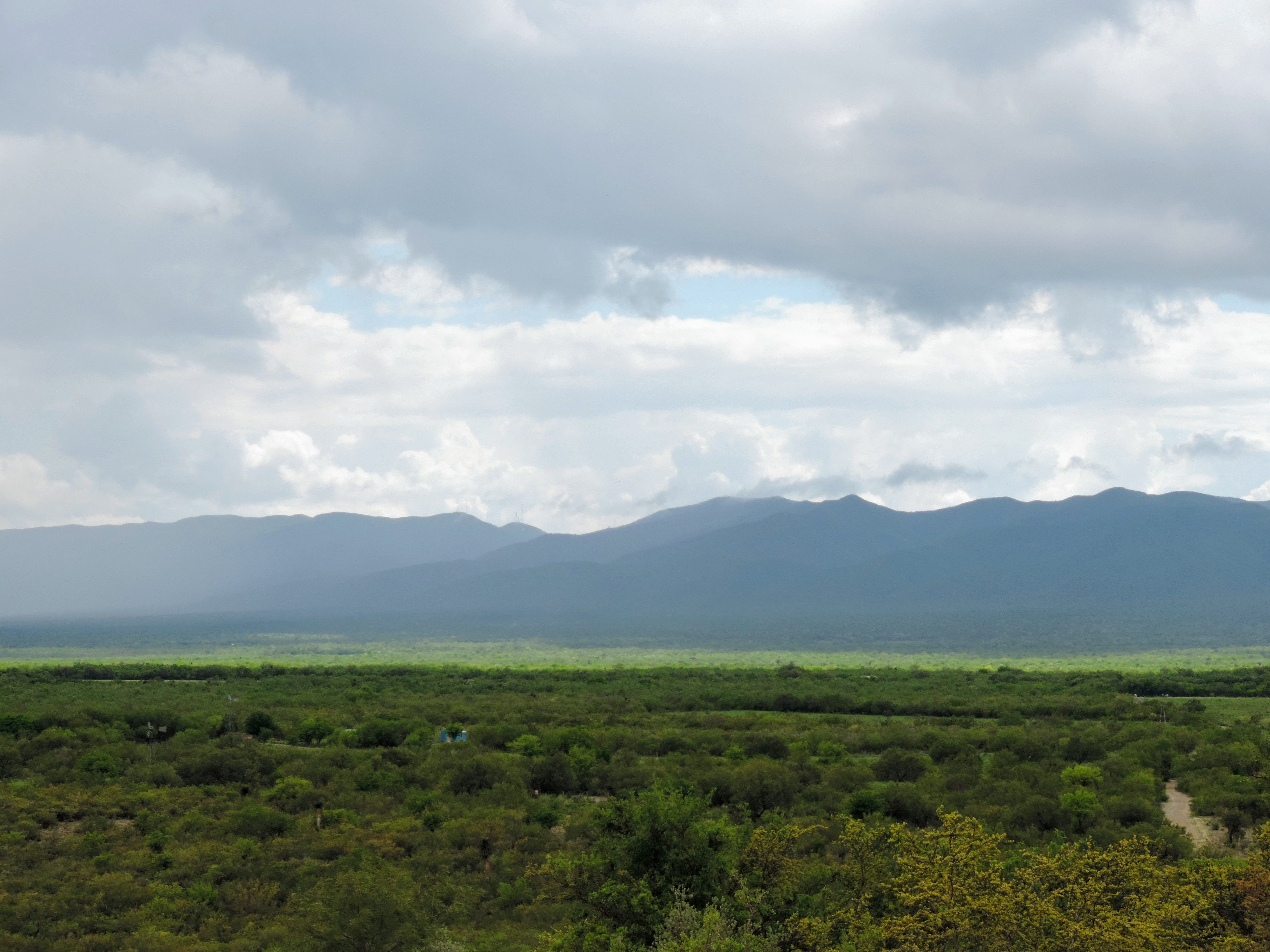 Sierra Papagayos desde la Loma Aura